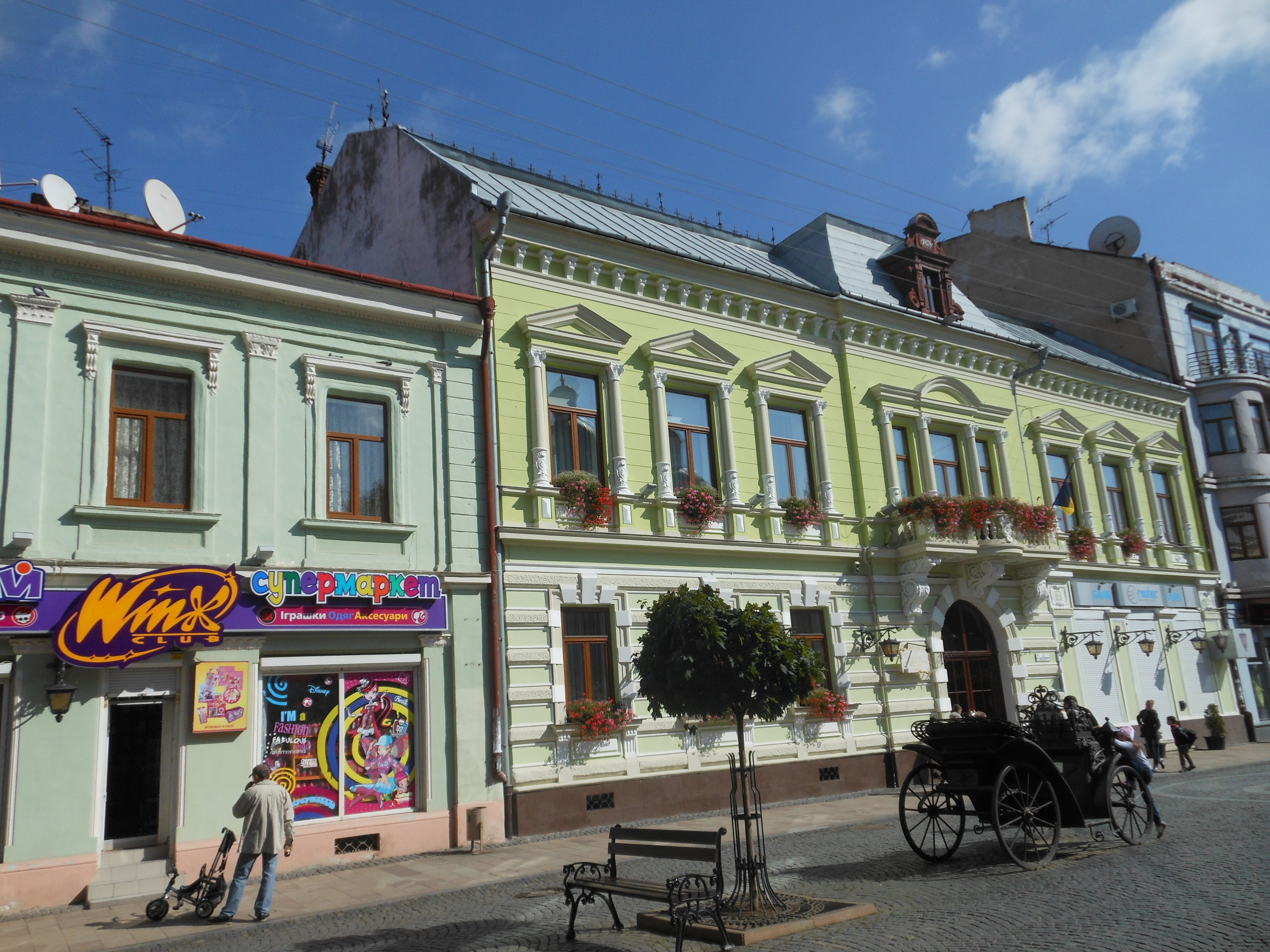 Житловий будинок, Чернівці, Кобилянської Ольги, 20